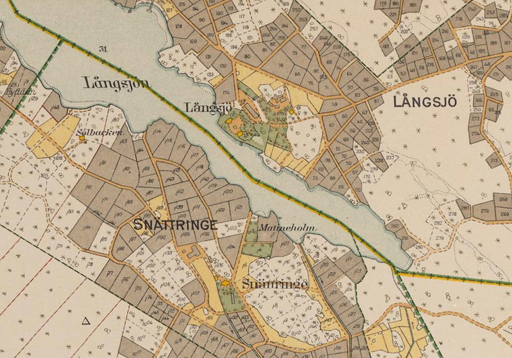 Långsjö Snättringe karta 1920-1930 (del av 1934 års karta över Stockholm med omgivningar)